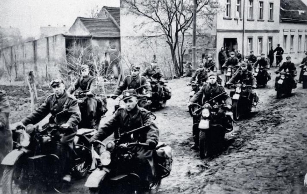 Oddział kwatermistrzowski, motocykliści 2. Armii Wojska Polskiego podczas operacji łużyckiej, kwiecień 1945 r., wyposażony w amerykańskie motocykle Harley-Davidson, dostarczane do ZSRR w ramach umowy Lend-Lease.